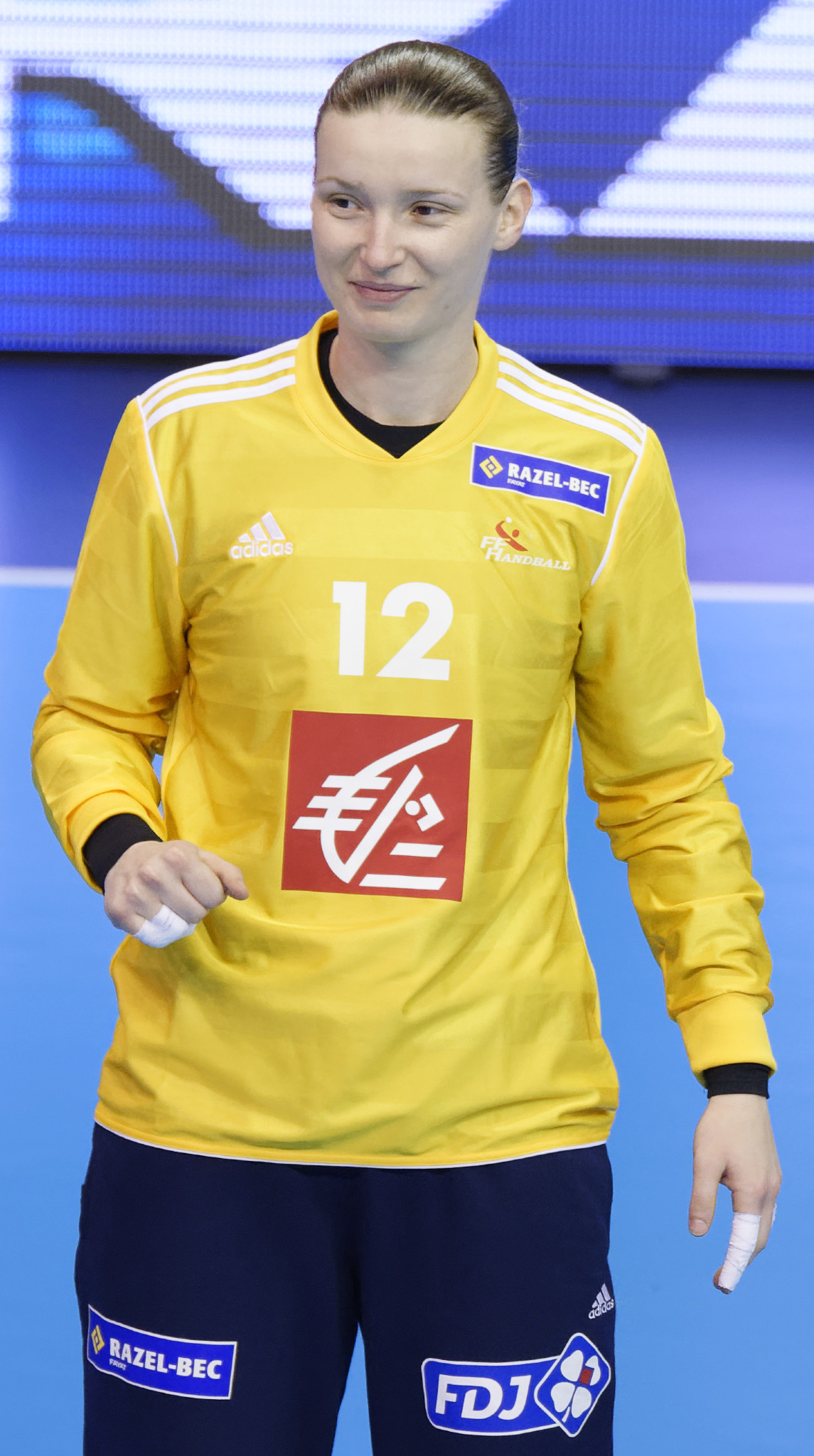 Rencontre entre la France et le Danemark lors de la Golden League 2015. A Dijon, le 19 mars 2015.